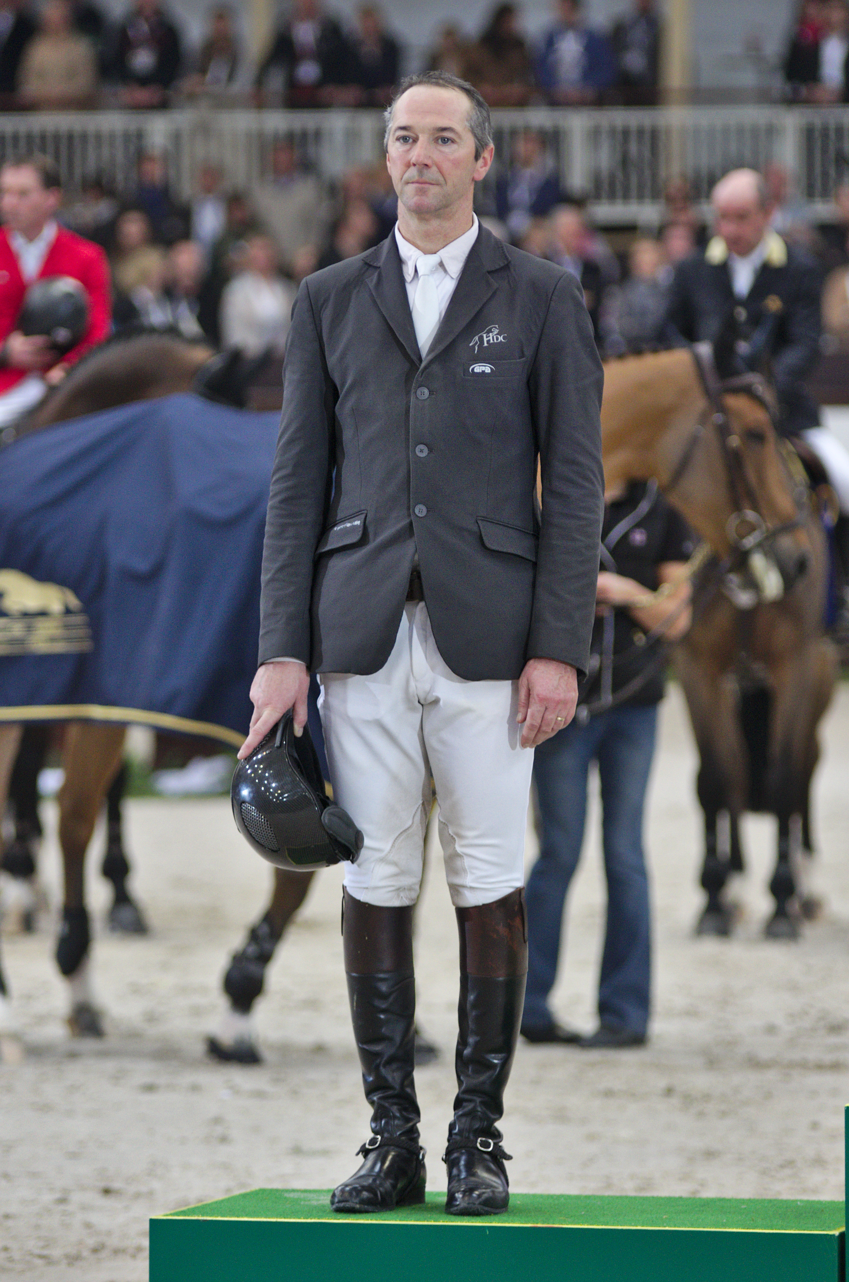 CHI Genève 2013 - 20131214 - Patrice Delaveau